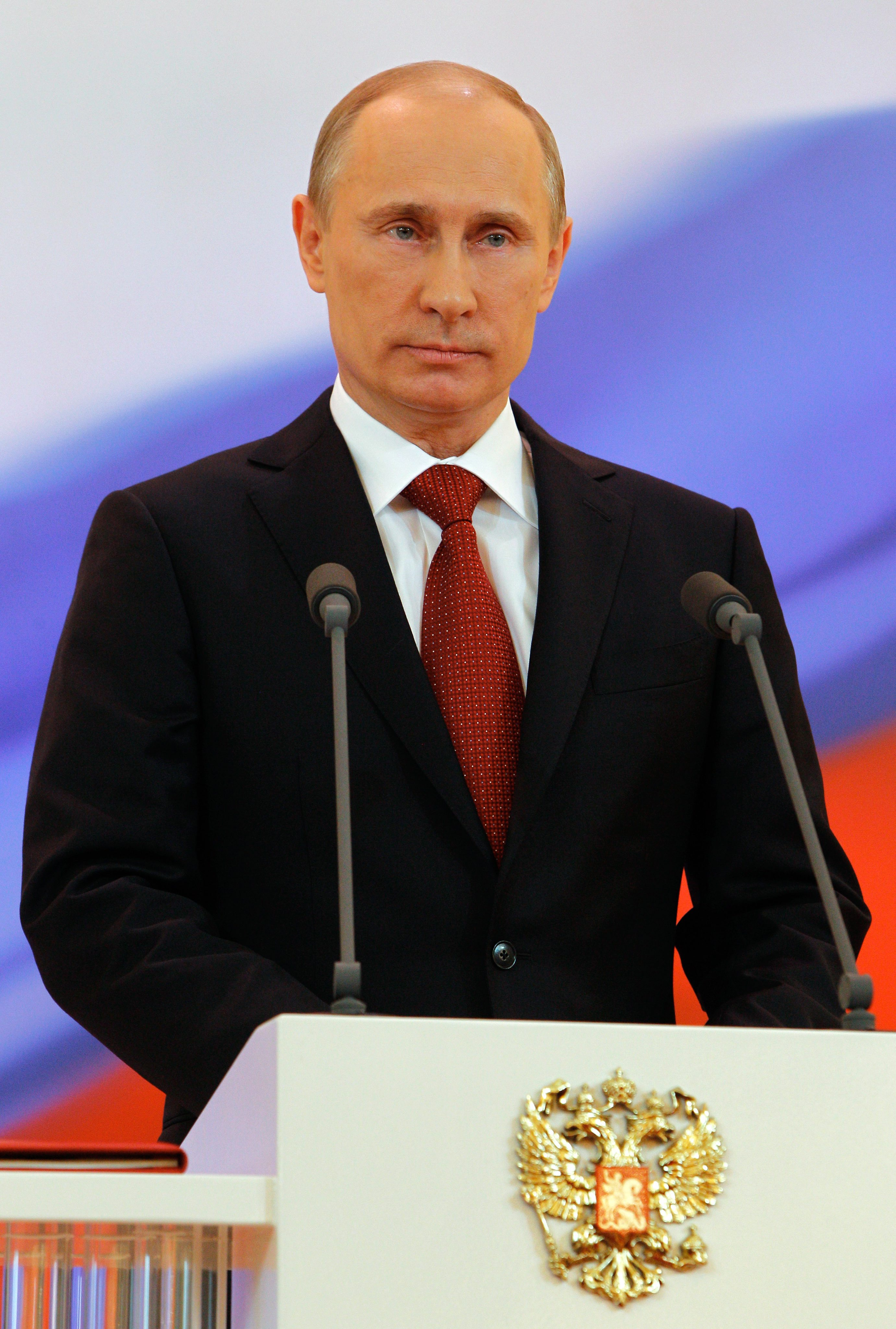 La ceremonia de inauguración de Vladímir Putin como Presidente de Rusia.